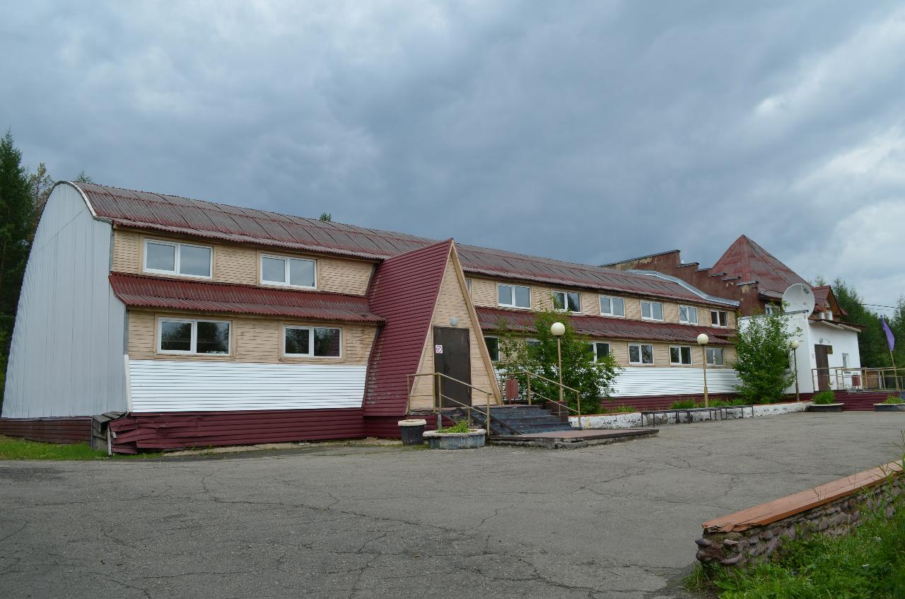 Село Иенгра, Нерюнгринский район, Якутия. Этнокультурный центр "Эян"